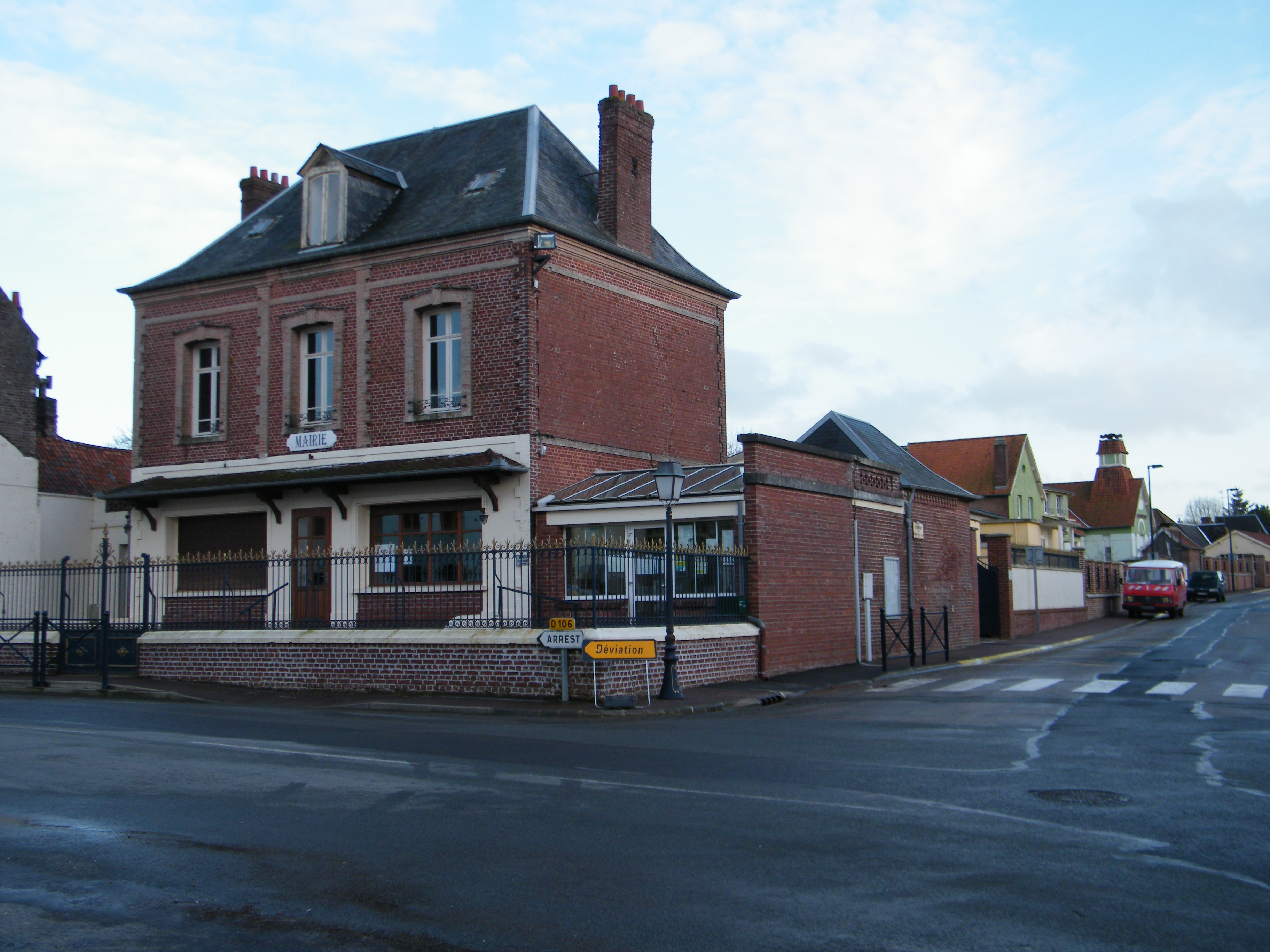 Mairie, bâtiments communaux et à droite, en vert, l'école Pierre Dupont.